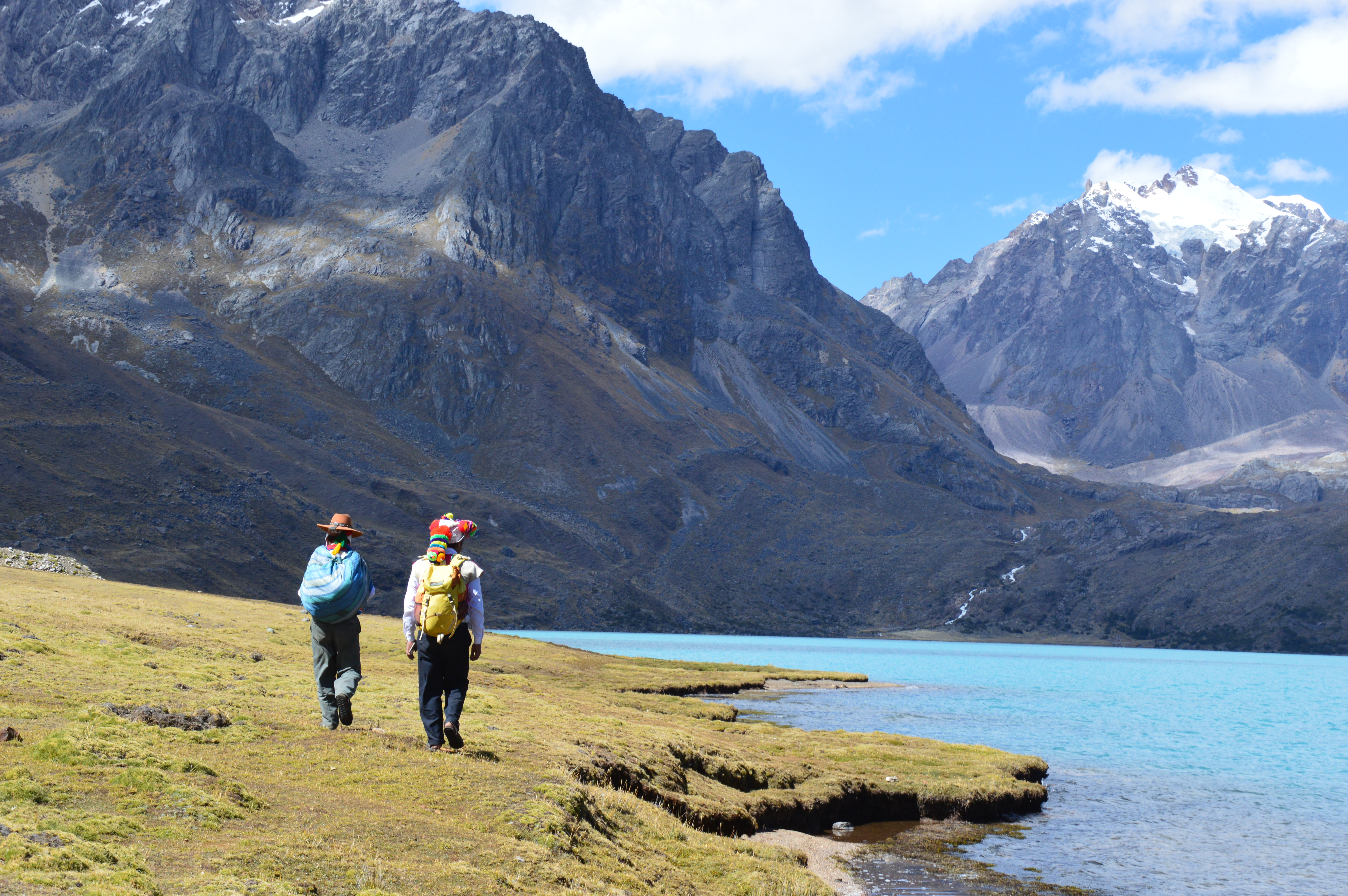 Comunidad de Yanacancha que vive en la Laguna Singrenacocha